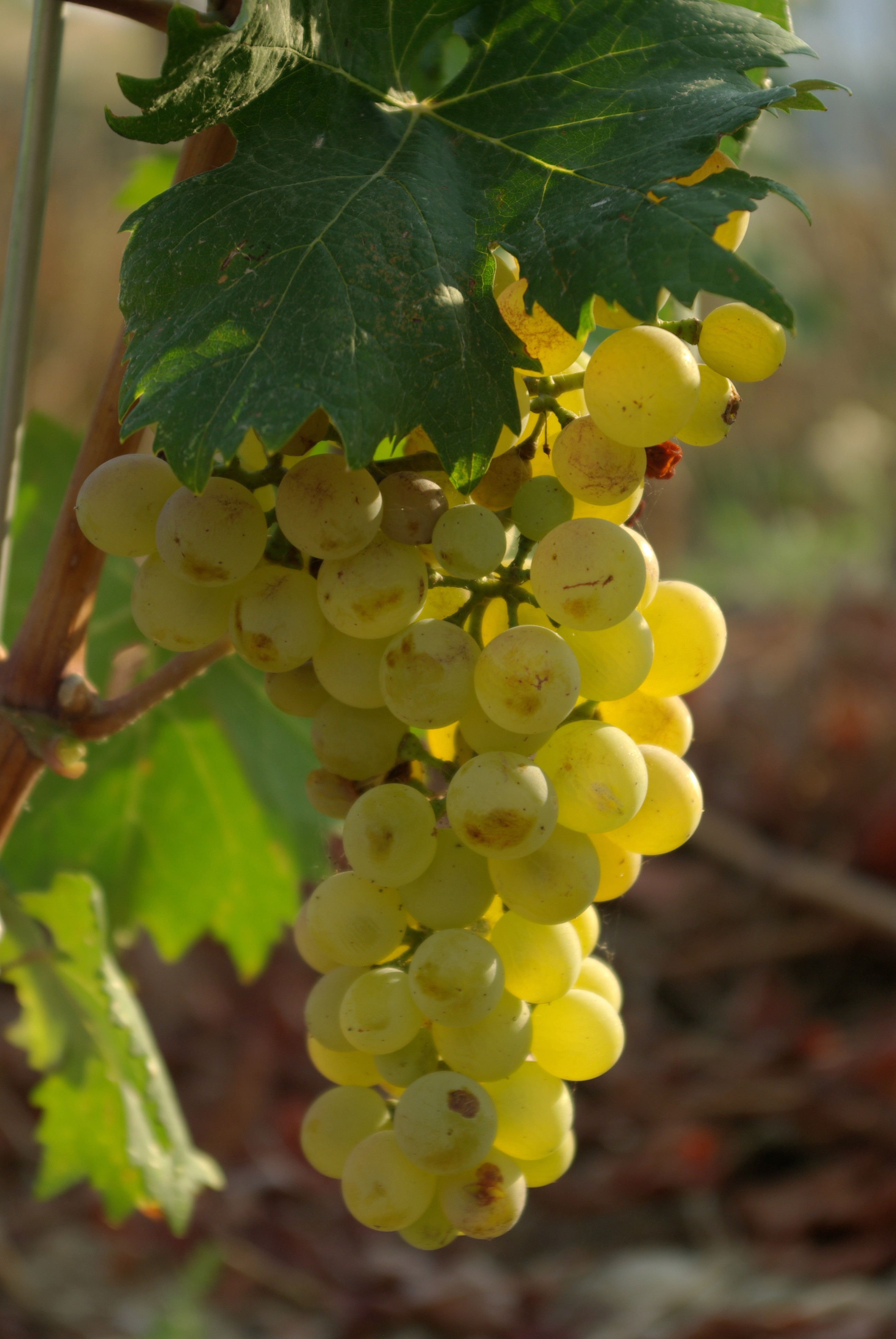 Grape variety: Rolle